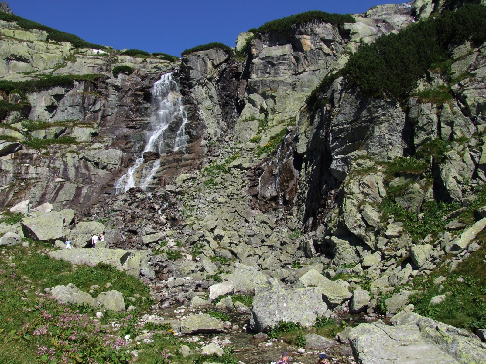 Wodospad Skok w Dolinie Młynickiej